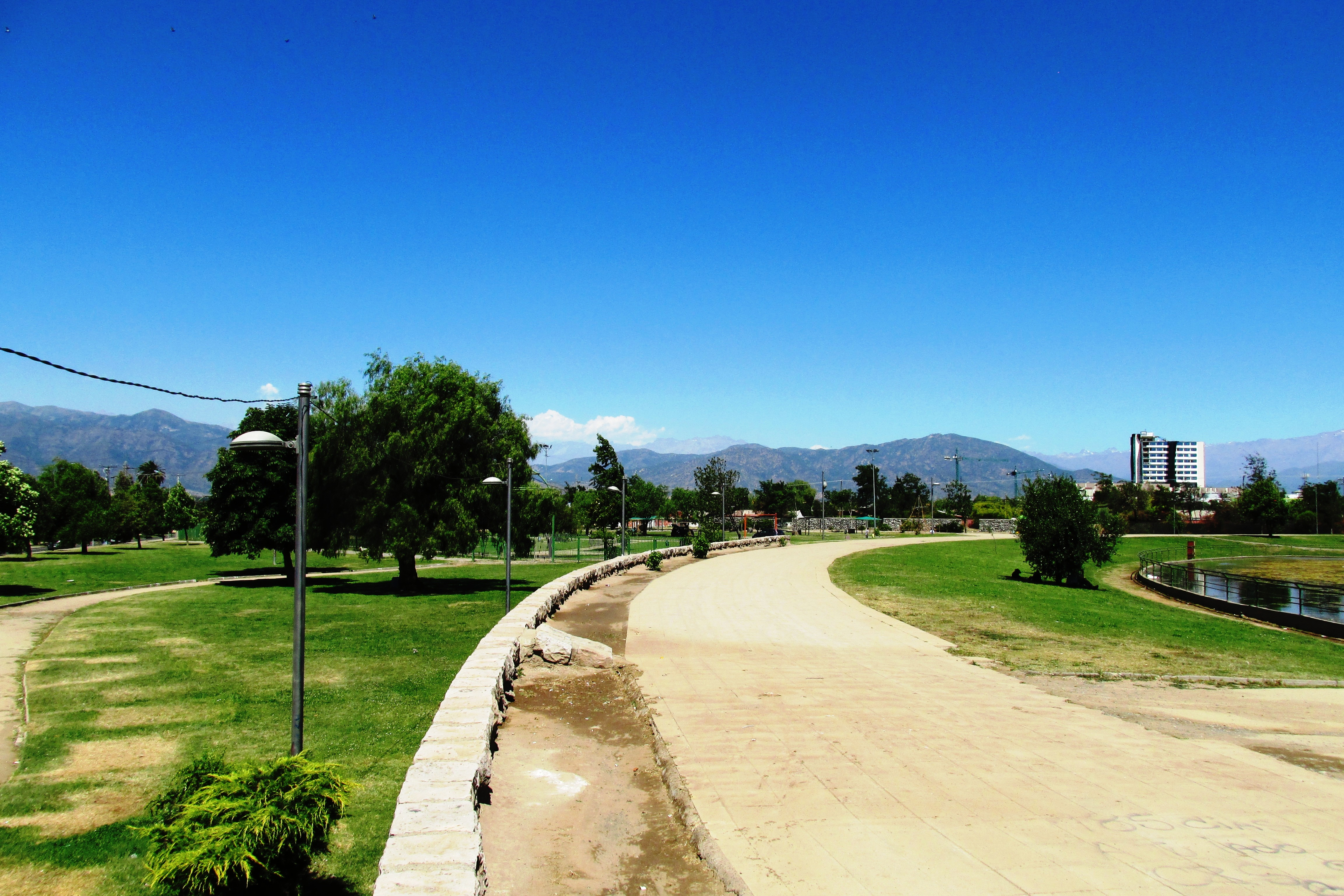 Parque Comunal Rancagua